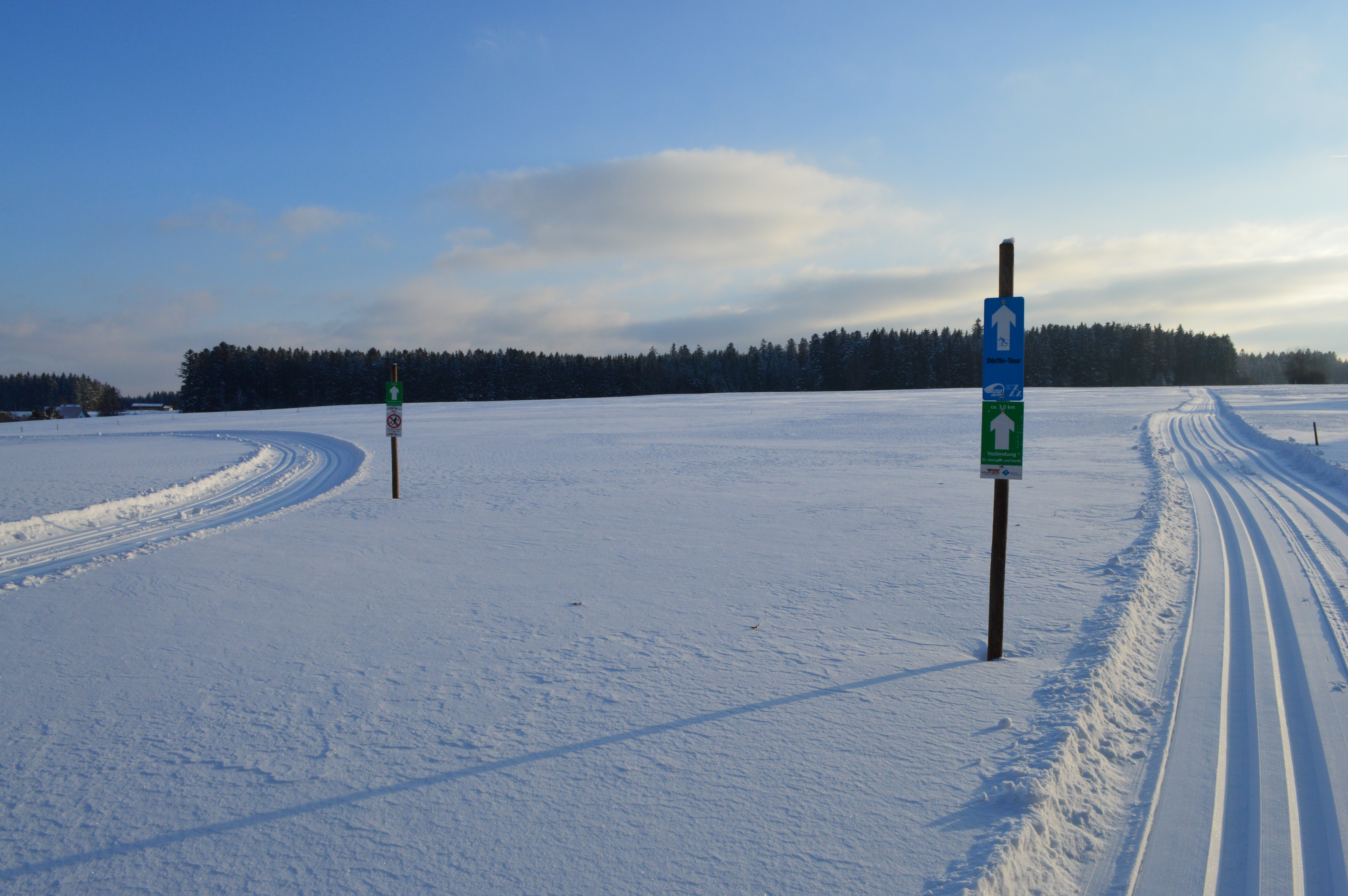 Buchenberg Loipe 2017